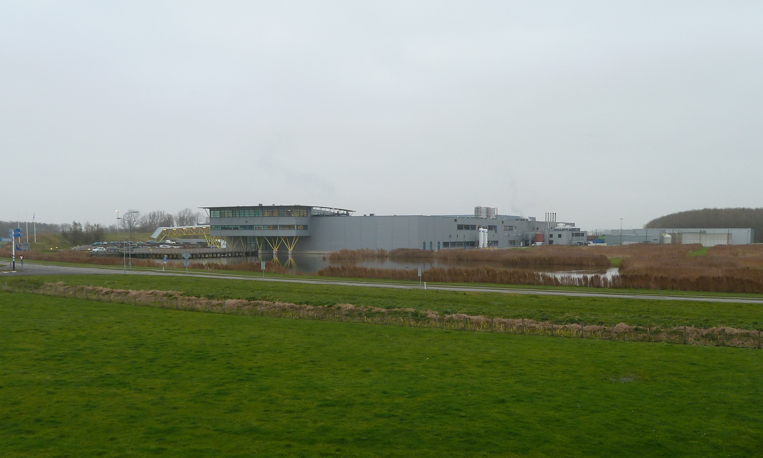 Gezicht op het gebouw van garnalenverwerker Heiploeg bij Zoutkamp.